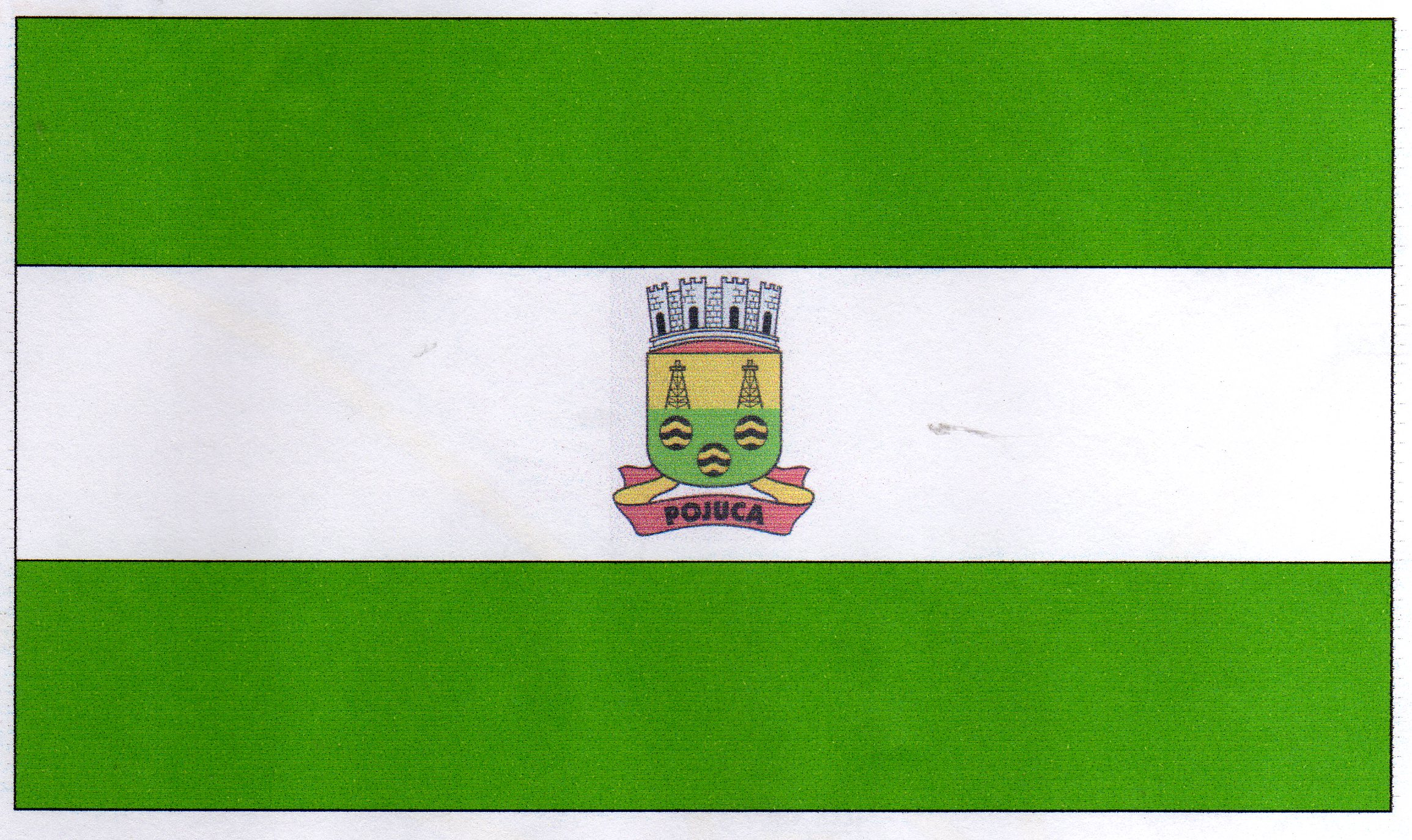 A bandeira de Pojuca foi criada no ano de 1939, sendo oficializada como bandeira Municipal em 29 de julho de 1940, quando foi apresentada pela Prefeitura Municipal aos cidadãos de Pojuca juntamente com o Brasão do município.